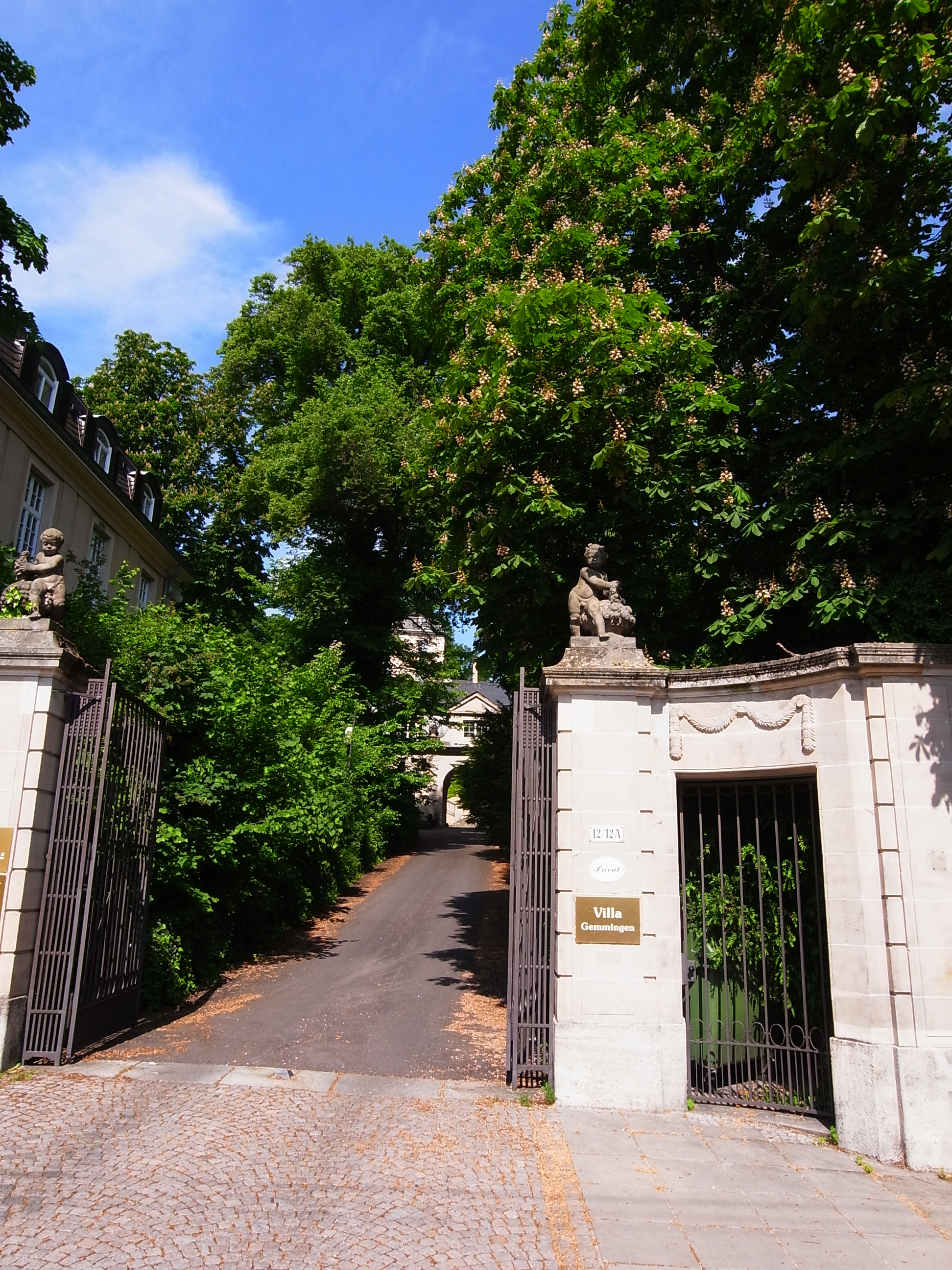 Zufahrt von der Mörikestraße